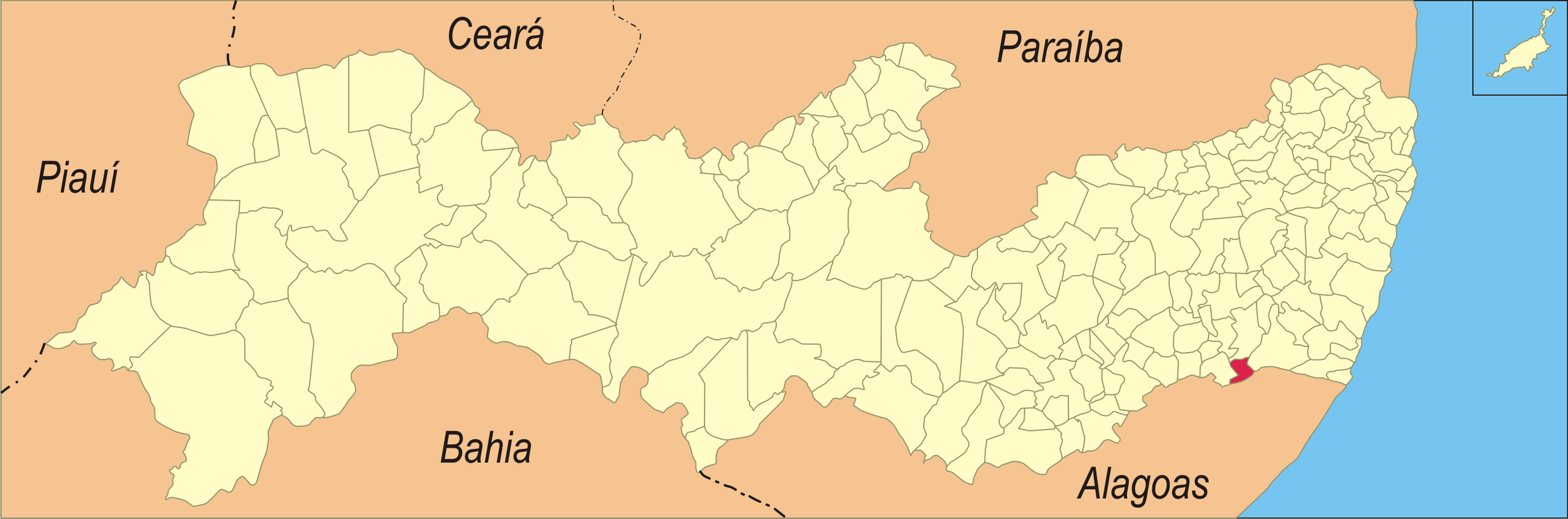 Localização da cidade em Pernambuco.